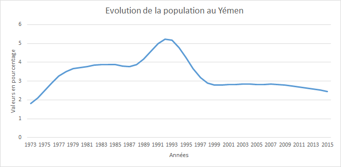 Les données ont été prises sur